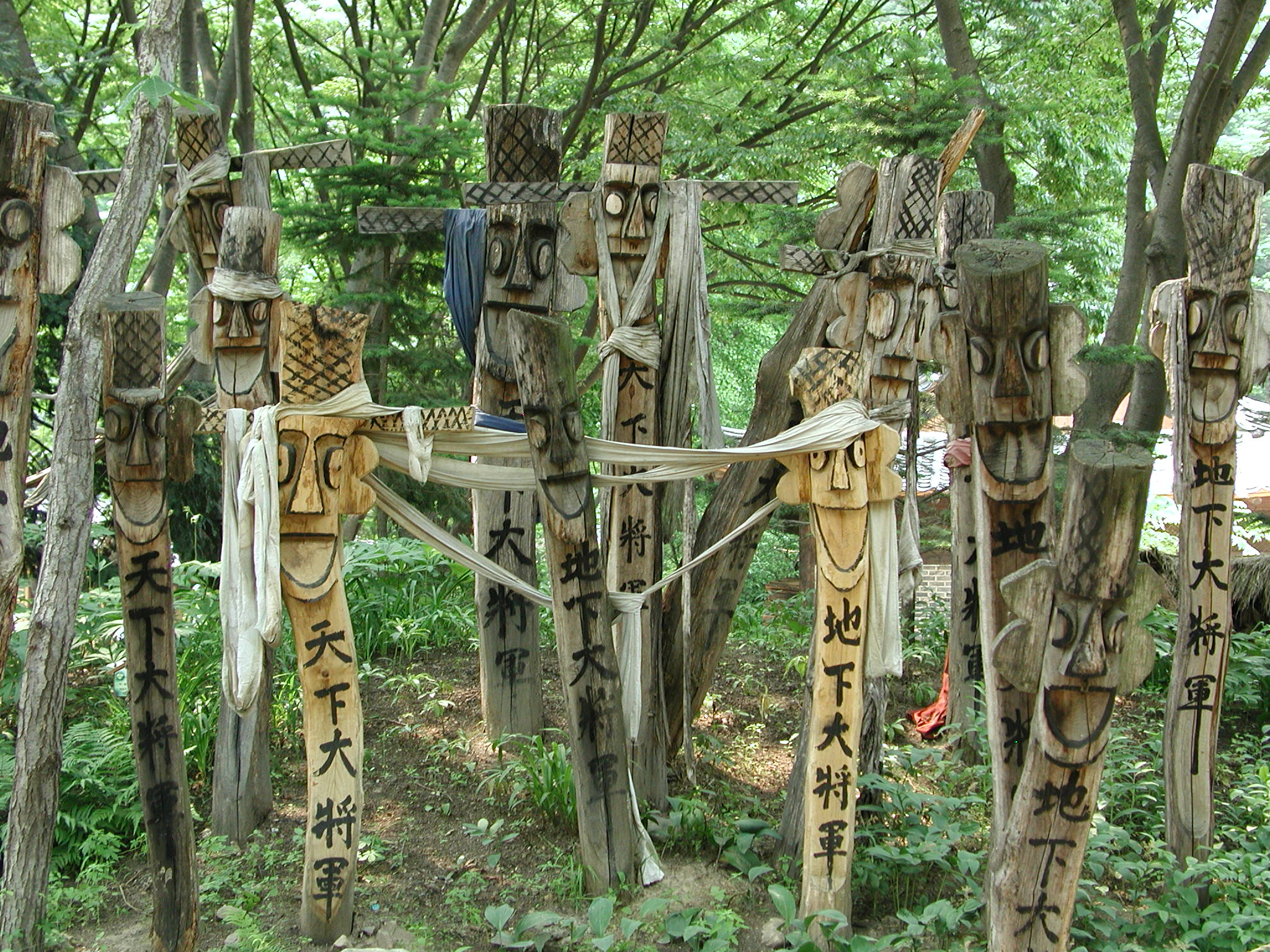 Jangseung, Korean totem at Korean Folk Village (Minsokchon) in Yongin, Gyeonggi-do, Korea